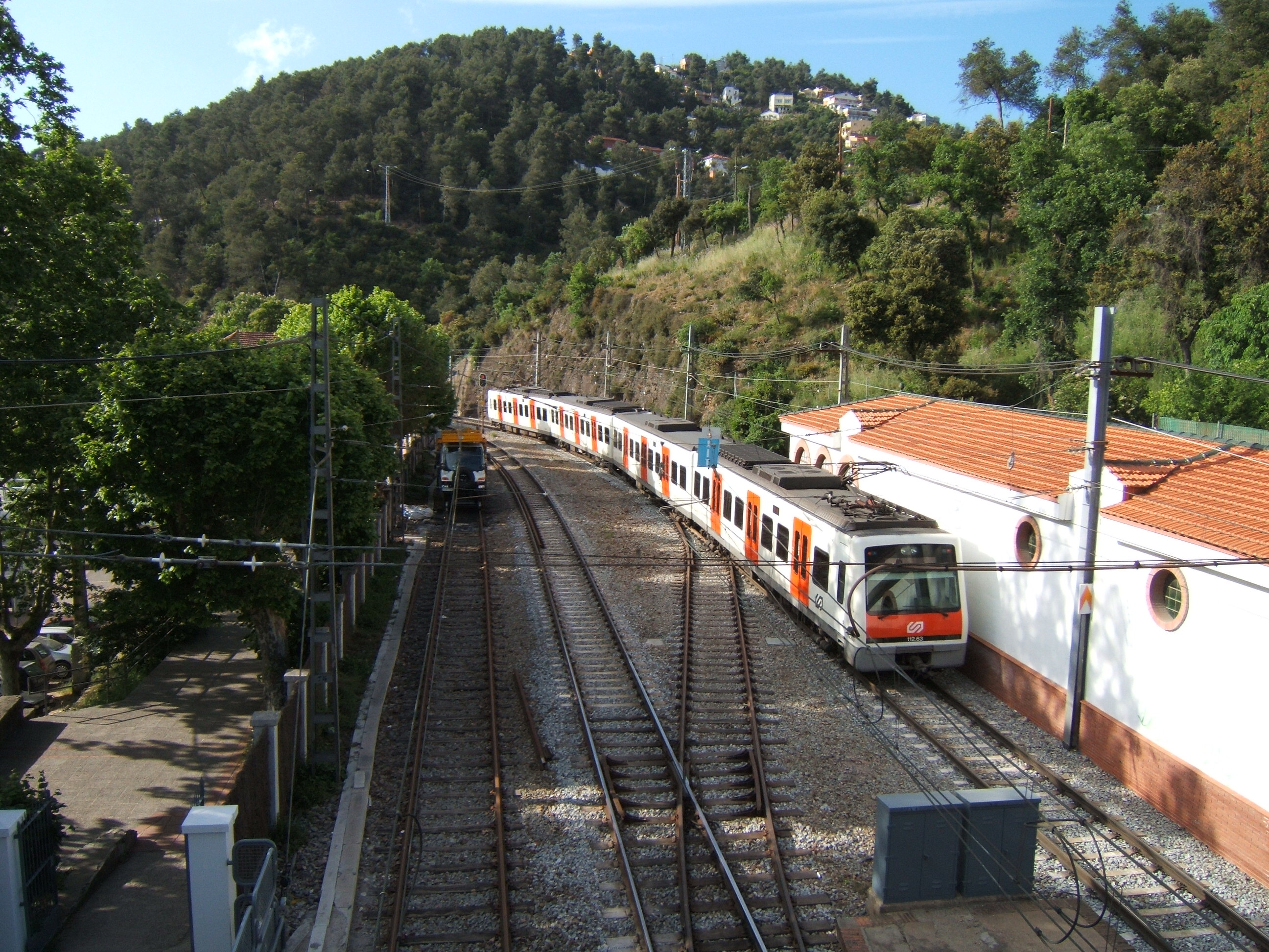 FGC treinen in Les Planes, het laatste station in de stadszone